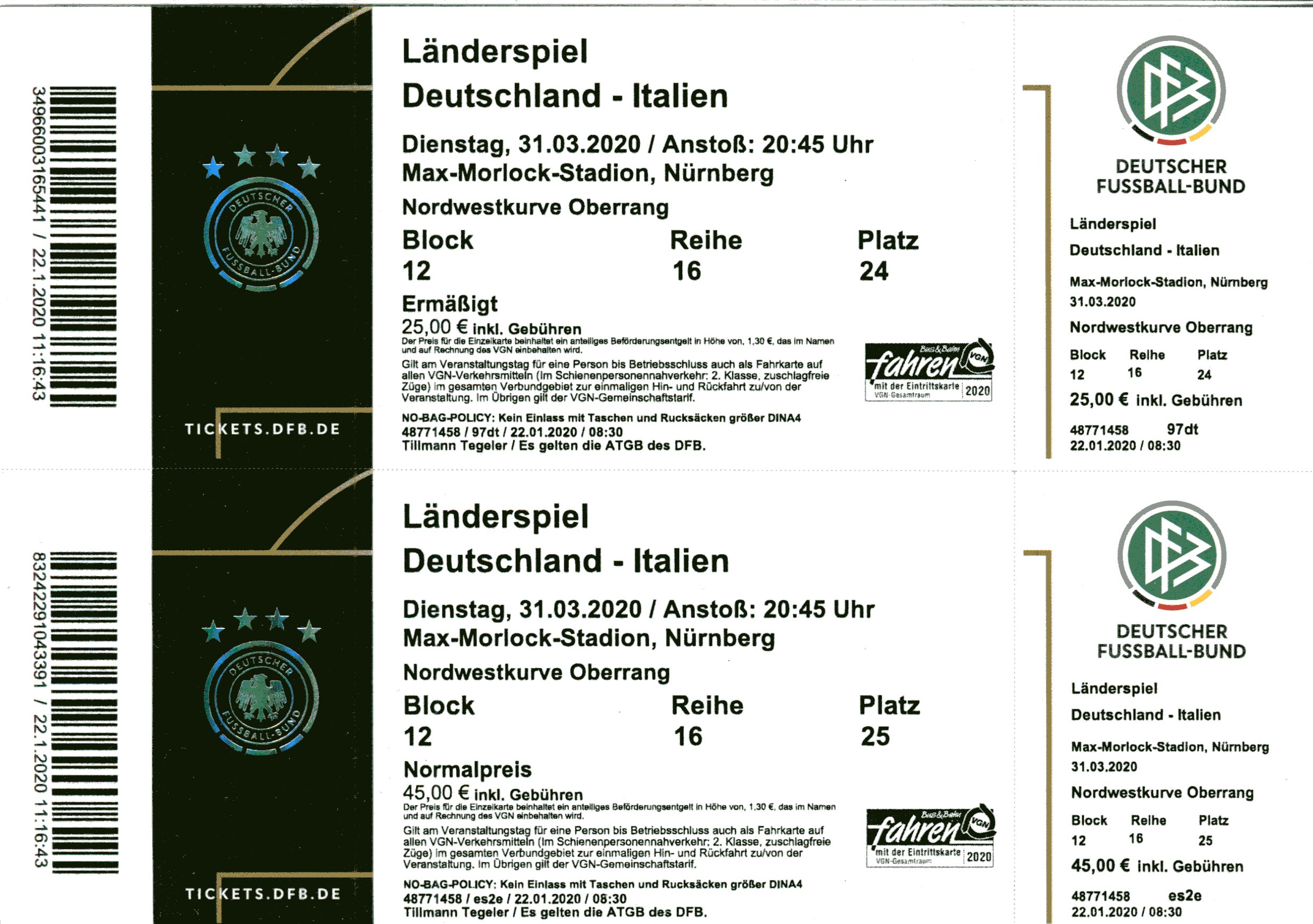 Das Länderspiel Deutschland-Italien, das am 31.03.2020 in Nürnberg stattfinden sollte, sollte zunächst wegen der Covid19-Pandemie vor leeren Rängen gespielt werden und wurde schließlich abgesagt.